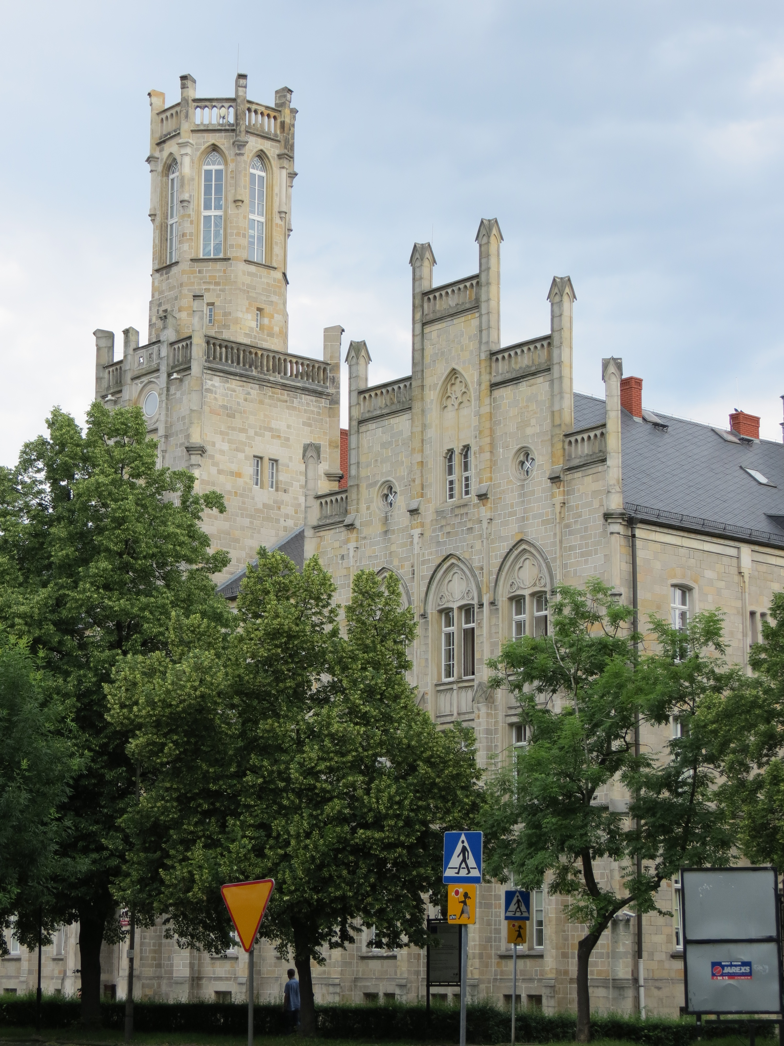 Bolesławiec, gimnazjum, ob. sąd rejonowy, 1861-1864